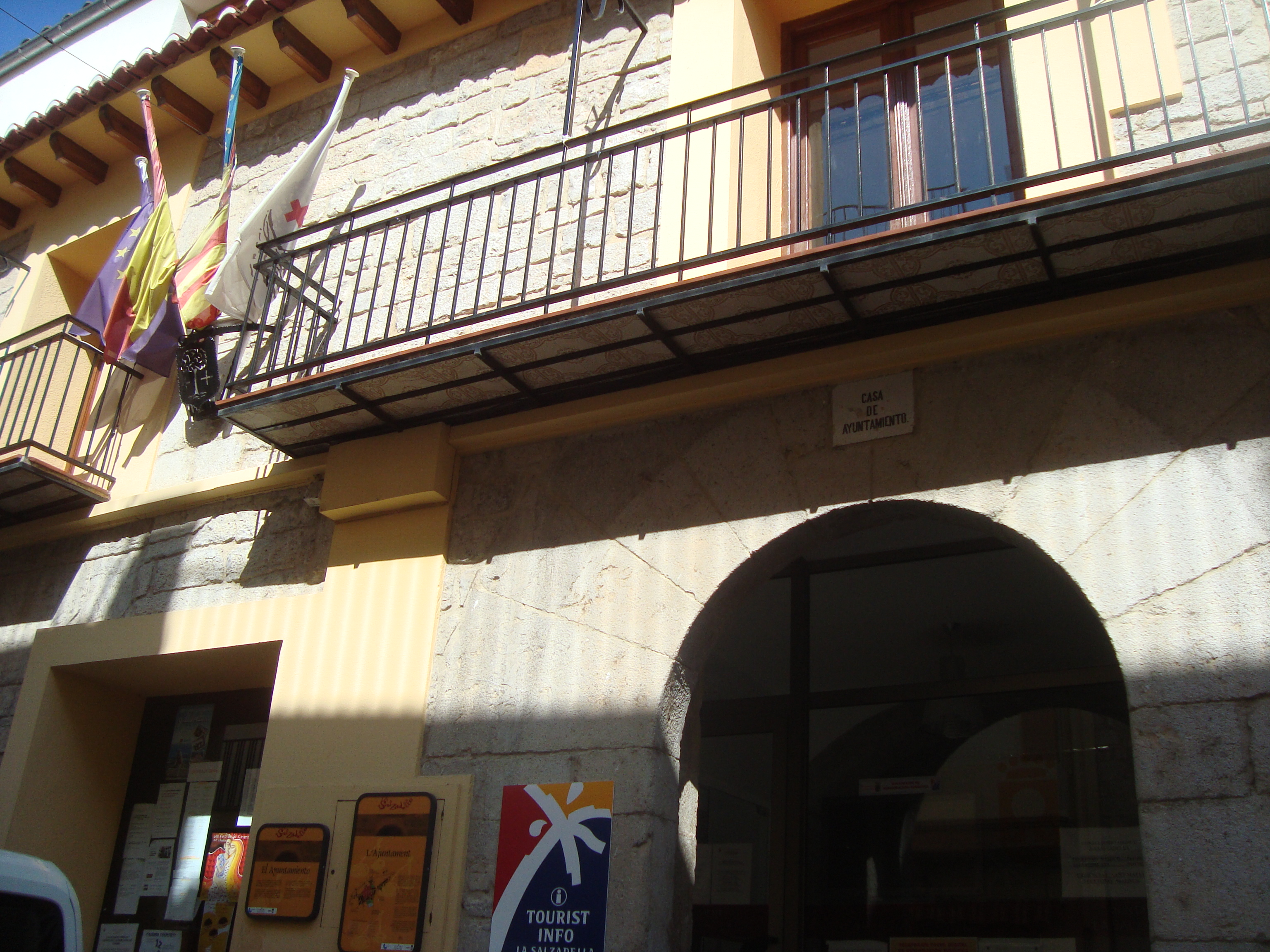 Ayuntamiento de la Salzadella (Castellón)